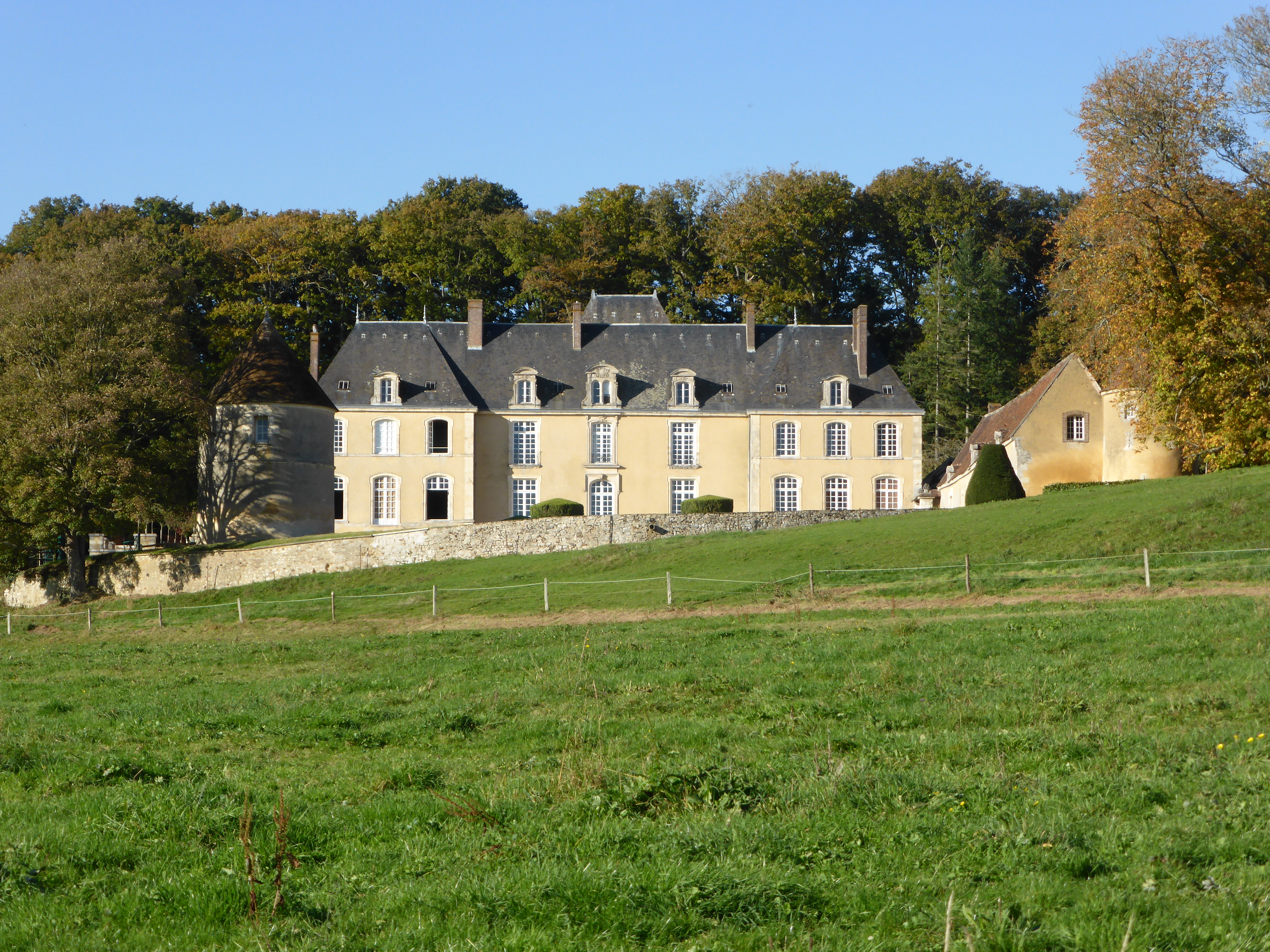 Château de l'Hermitière, dans l'Orne, en France.